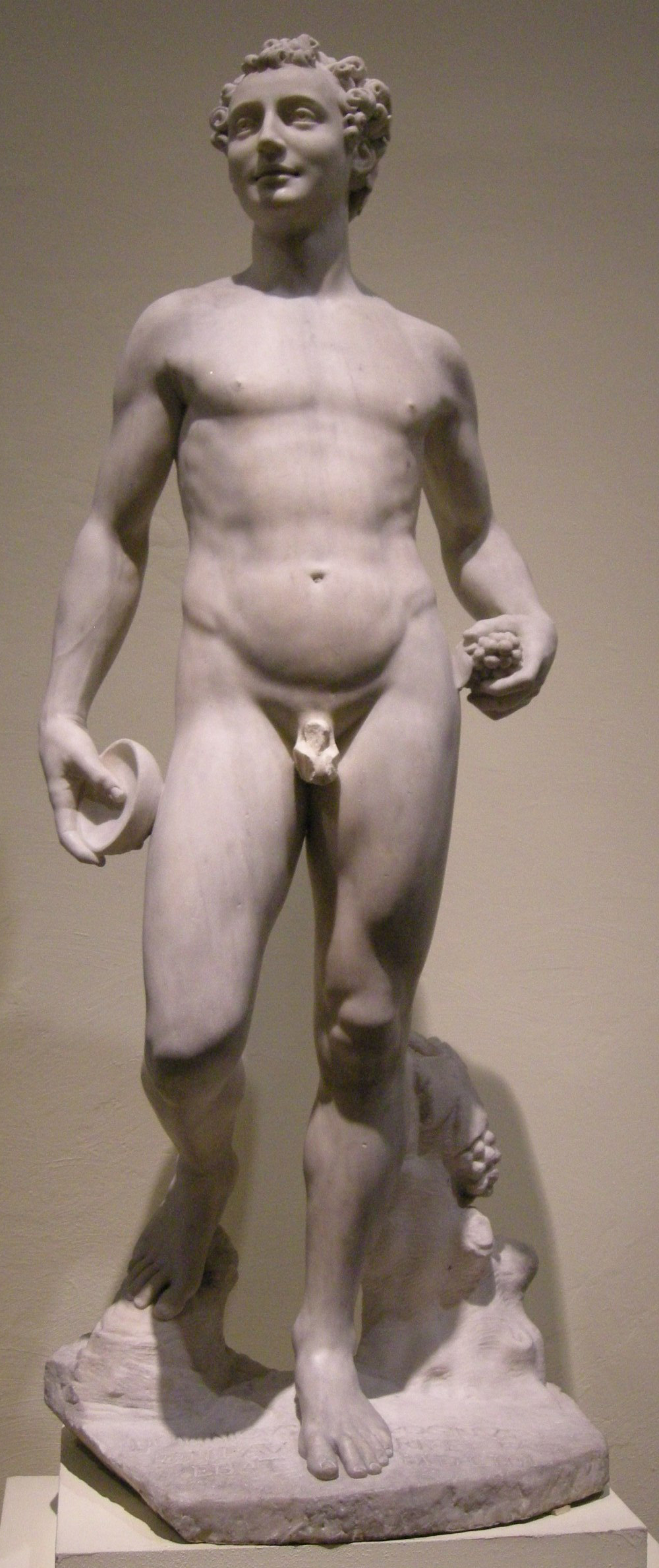 Domenico poggini, bacco, 1554